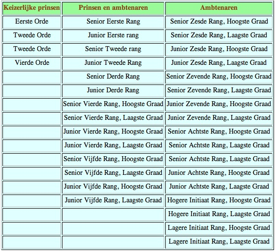 Hovelijke rangen in Japan tijdens de Muromachi periode. Zelfgemaakt en geschonken aan het domein.